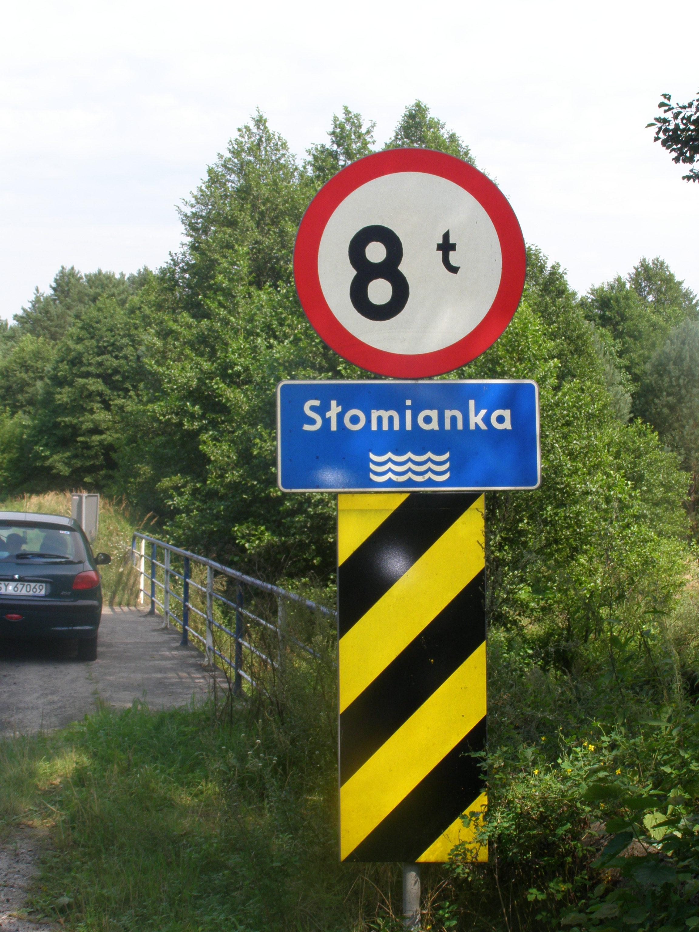 Rzeka Słomianka przepływająca obok miejscowości Inowłódz , przed ujściem do Pilicy.